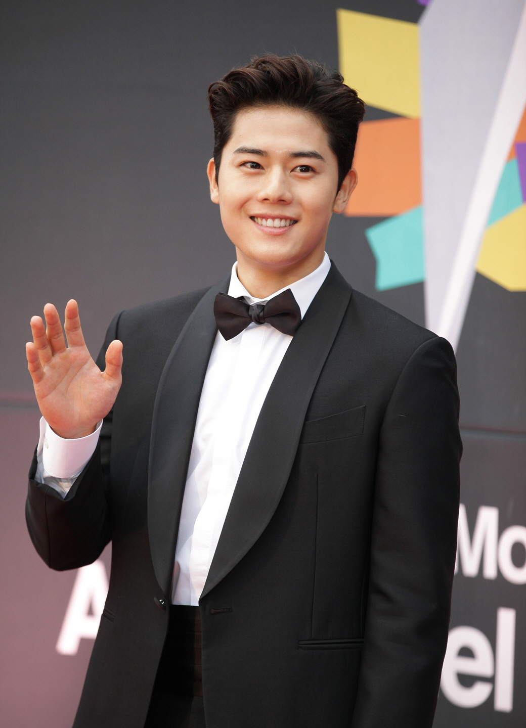 2017 아시아 모델 페스티벌 레드카펫